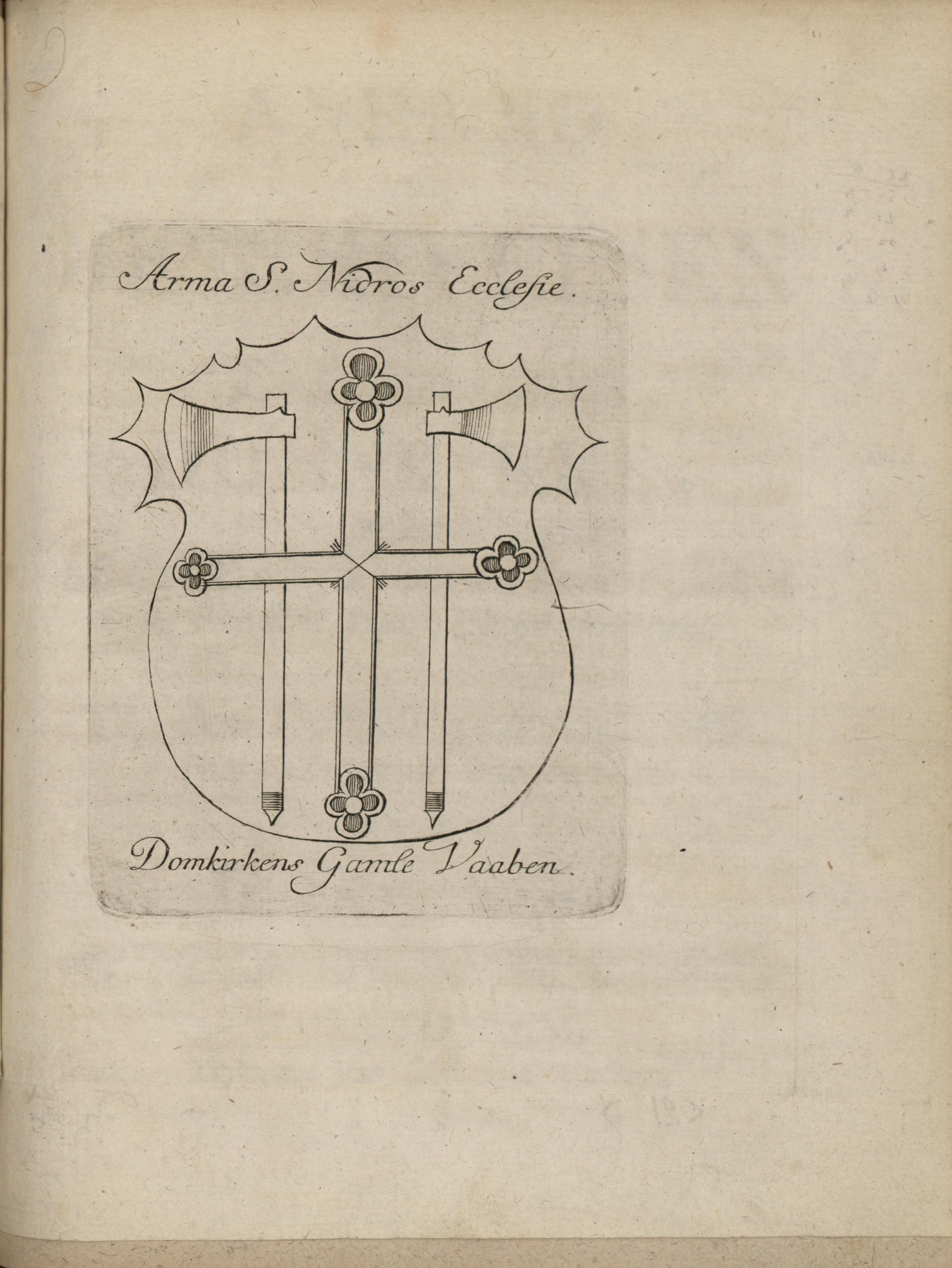 Illustrasjon hentet fra boken "Beskrivelse over den tilforn meget prægtige og vidtberømte Dom-Kirke i Throndhjem, egentligen kaldet Christ-Kirken" av Schøning, Gerhard og utgitt av Trykt hos Jens Christensen Winding (Trondheim, 1762)